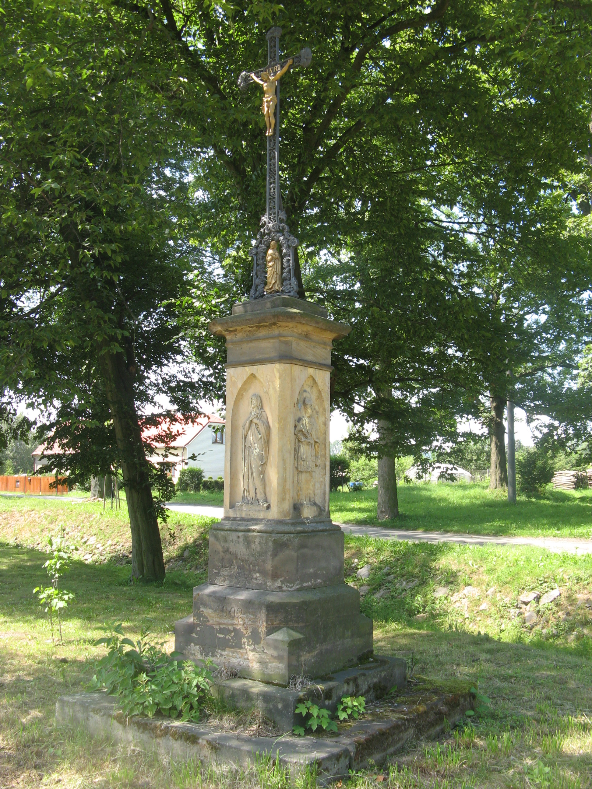 Kříž stojí v místech již zbořené kaple sv. Ducha, Svitavy-Lačnov